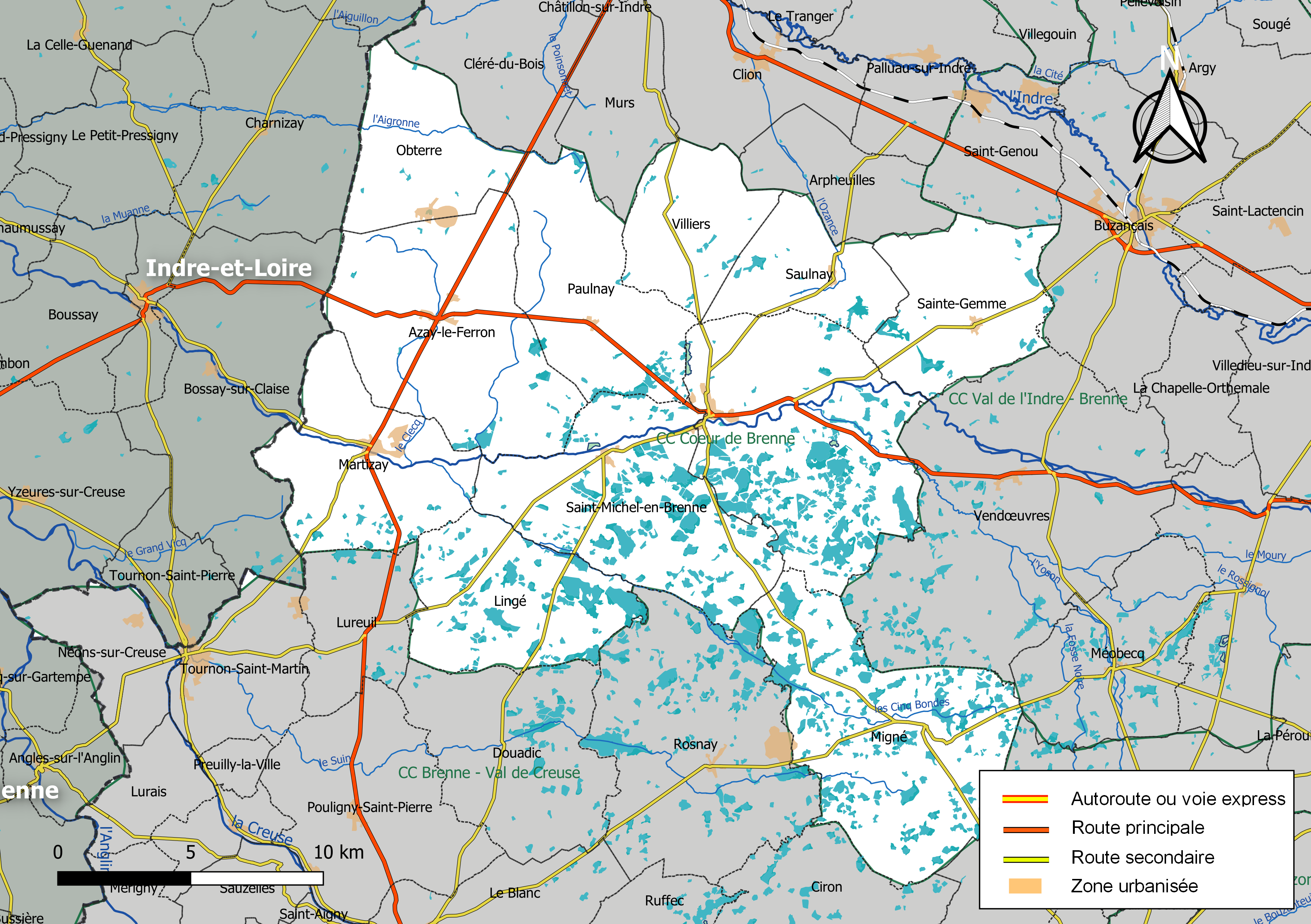 Carte de la communauté de communes Cœur de Brenne, département de l'Indre, France. Composition au 1er janvier 2019.